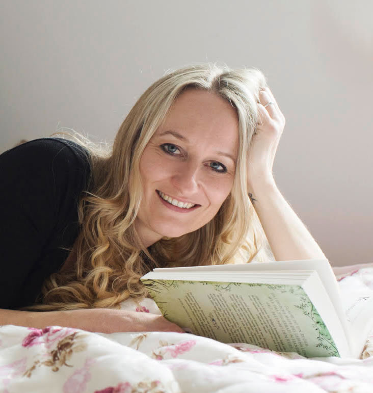 Die Autorin Mira Valentin 2018